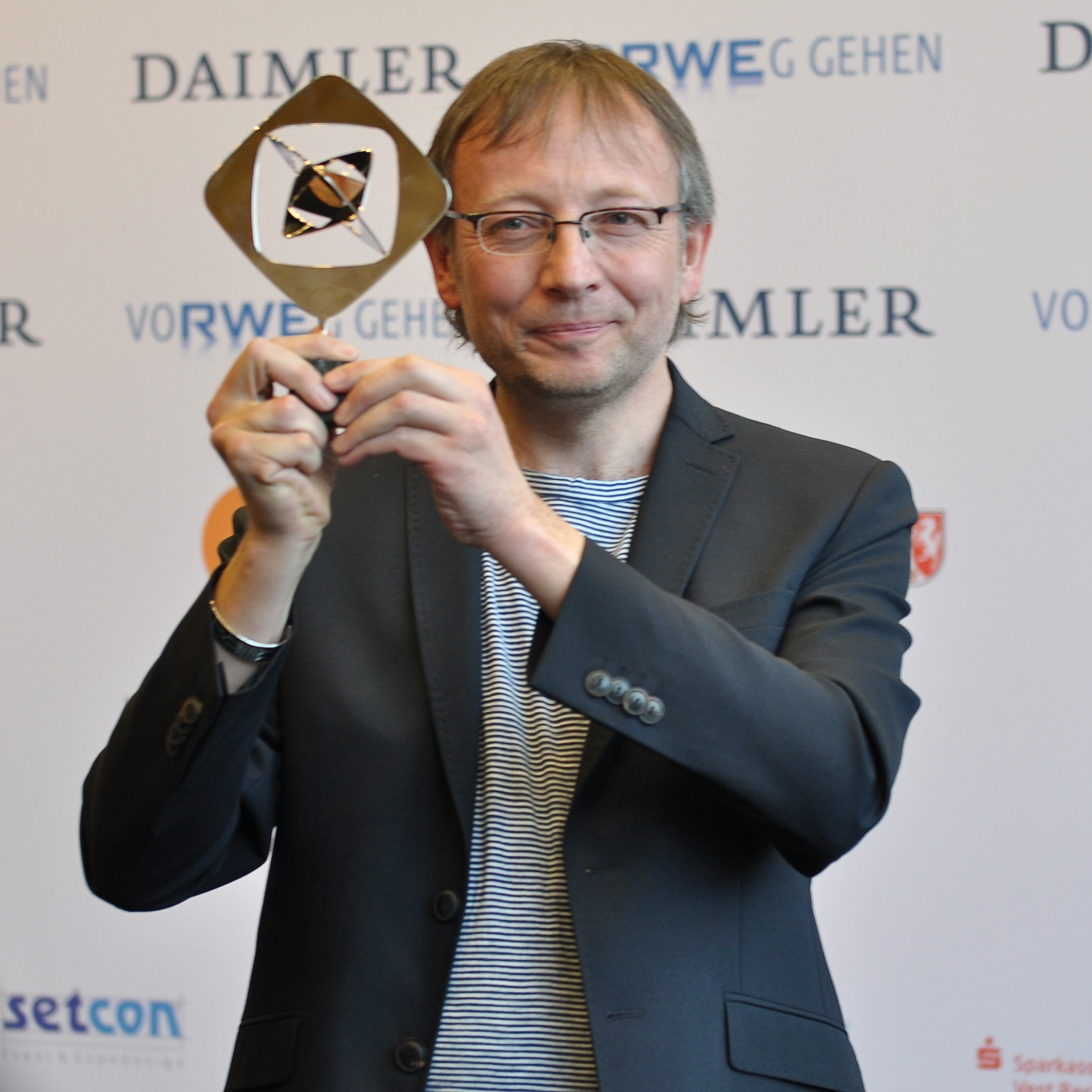 Verleihung des Grimme-Preises 2015.